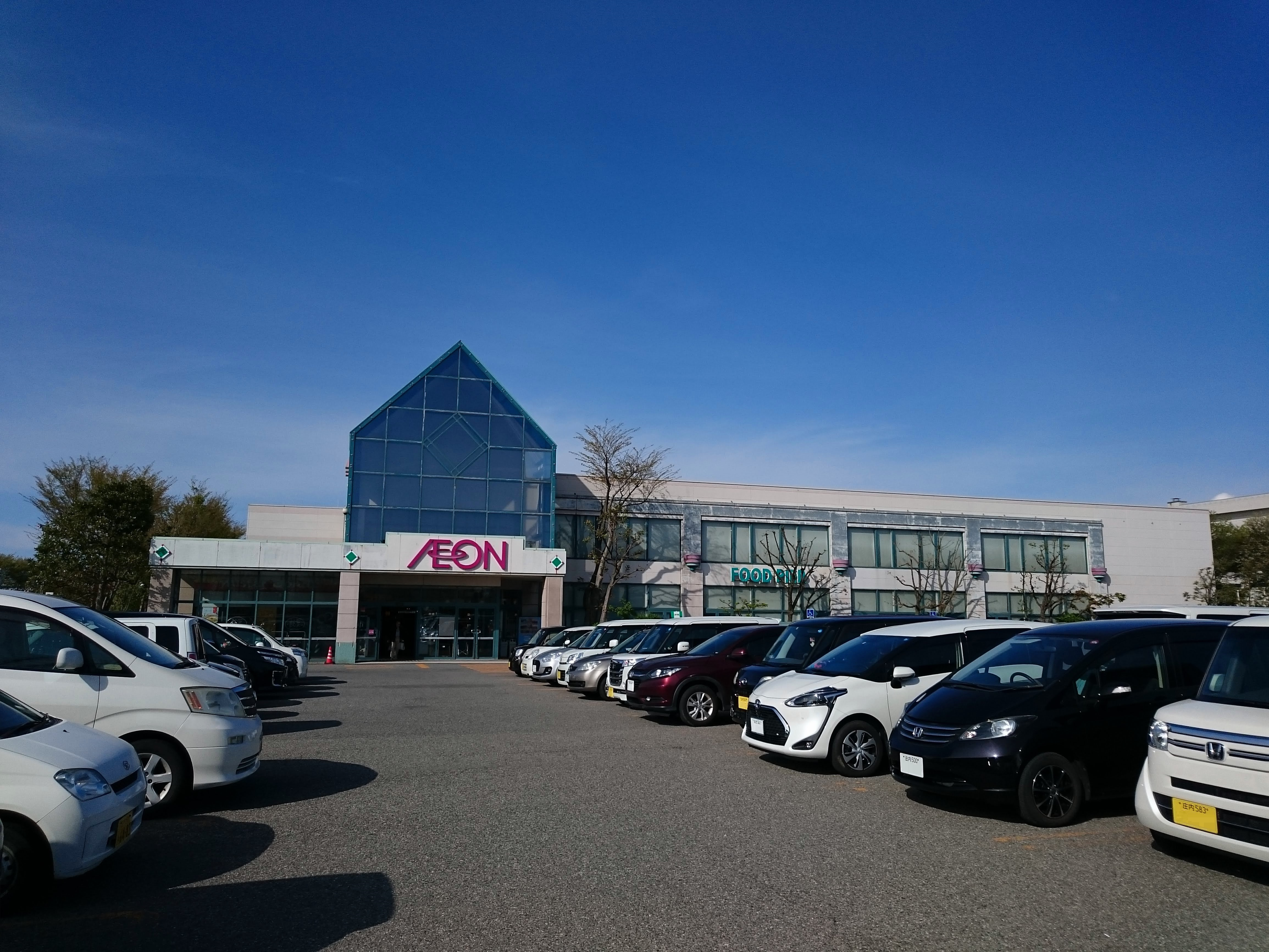 イオン酒田南店の外観